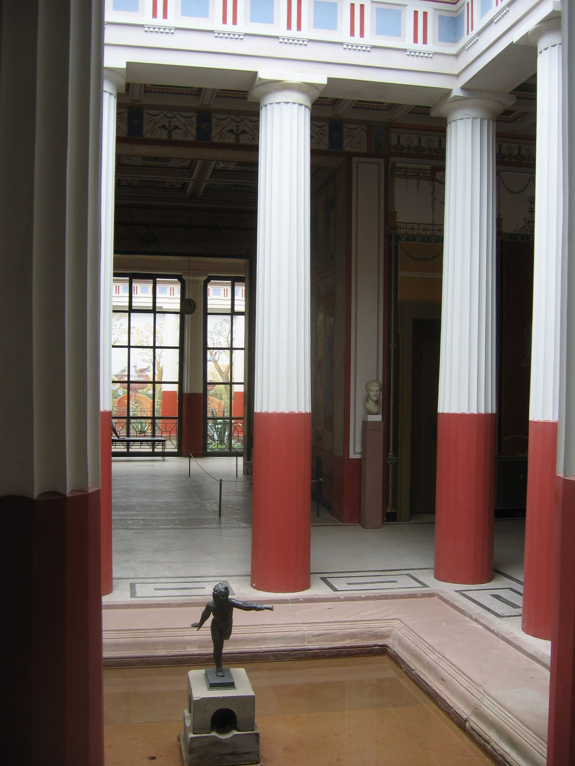 Pompeijanum, innen